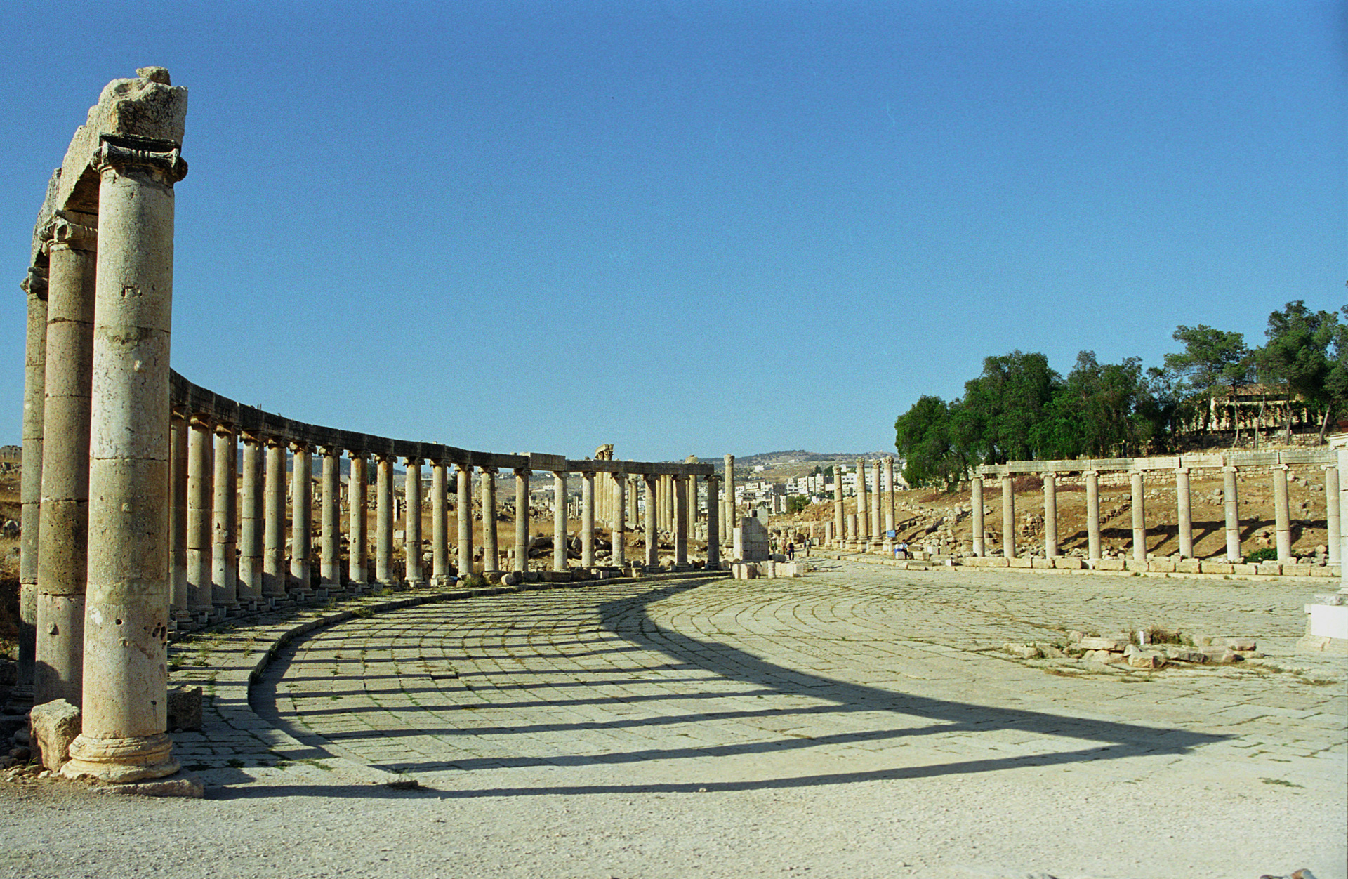 Jerash, Jordan